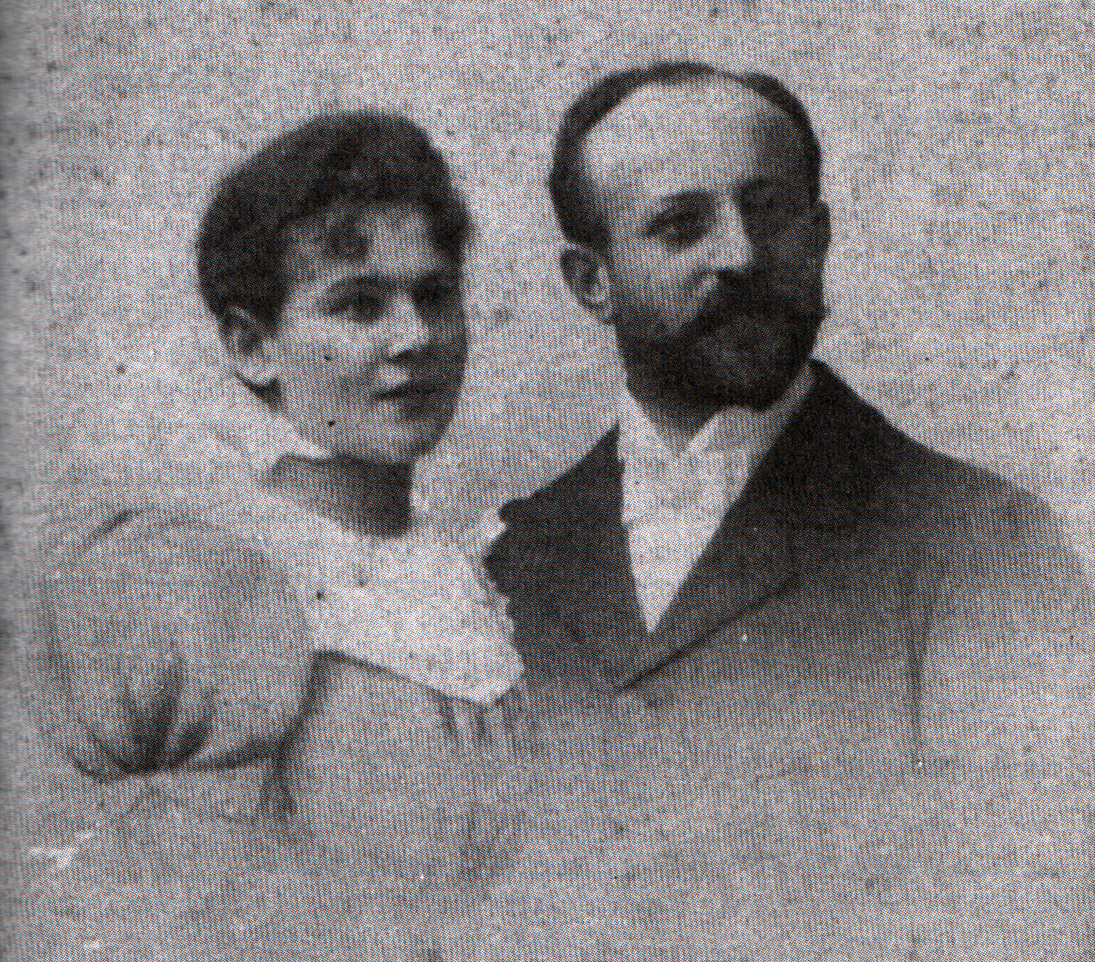 Hochzeitsfoto von Auguste und Bernhard Mayer (* 22. Juli 1866 in Laufersweiler; † 18. Juli 1946 in Zürich; Kürschner, Pelzhändler, Mäzen und Kunstsammler). 1897. Platinotypie.